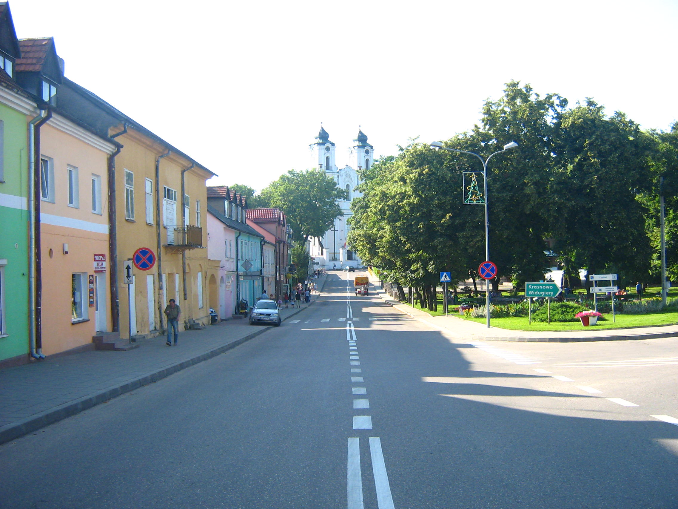 Ulica Józefa Piłsudskiego w Sejnach będąca odcinkiem drogi wojewódzkiej nr 653.